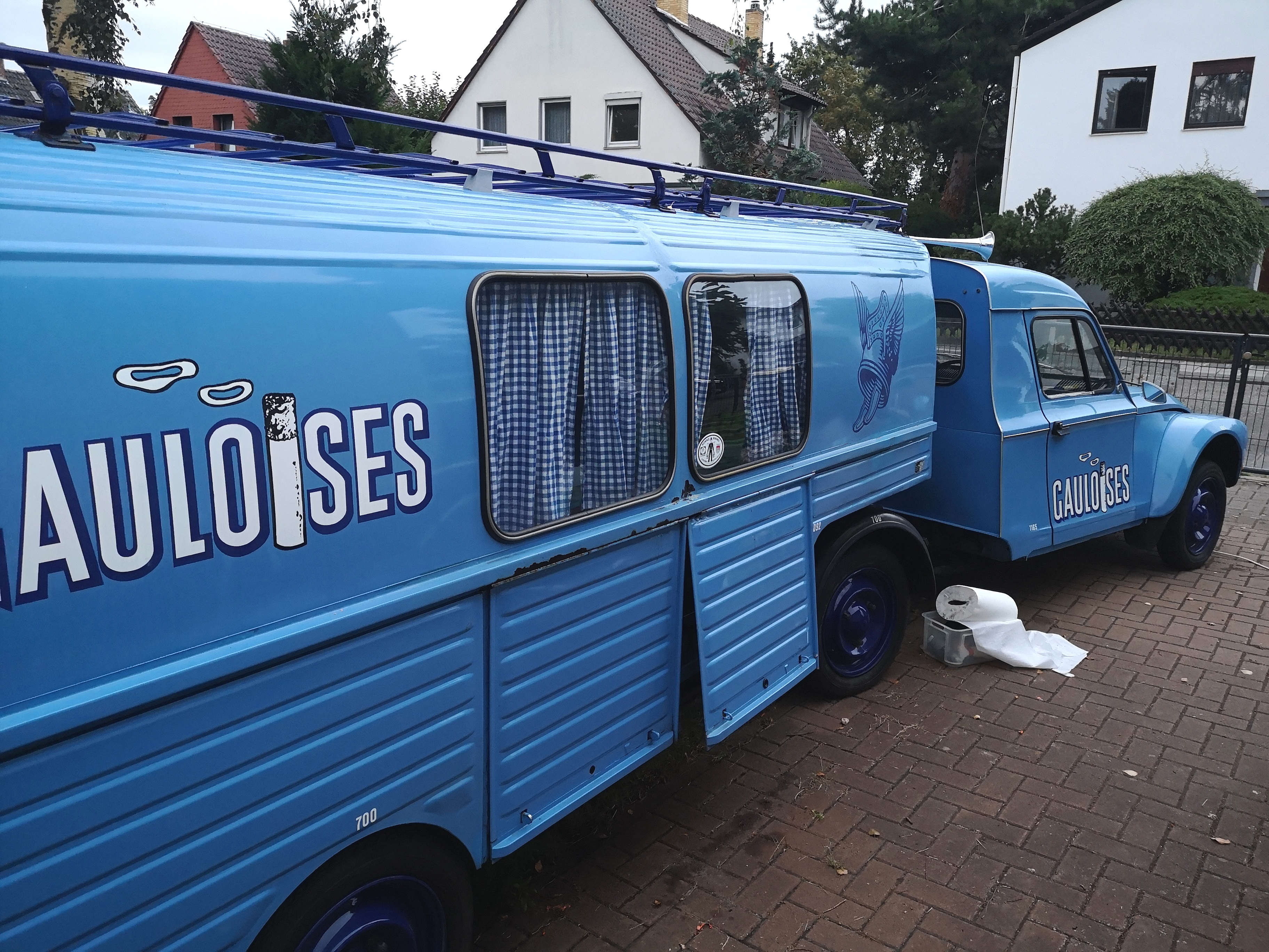 Gauloises Enten Truck